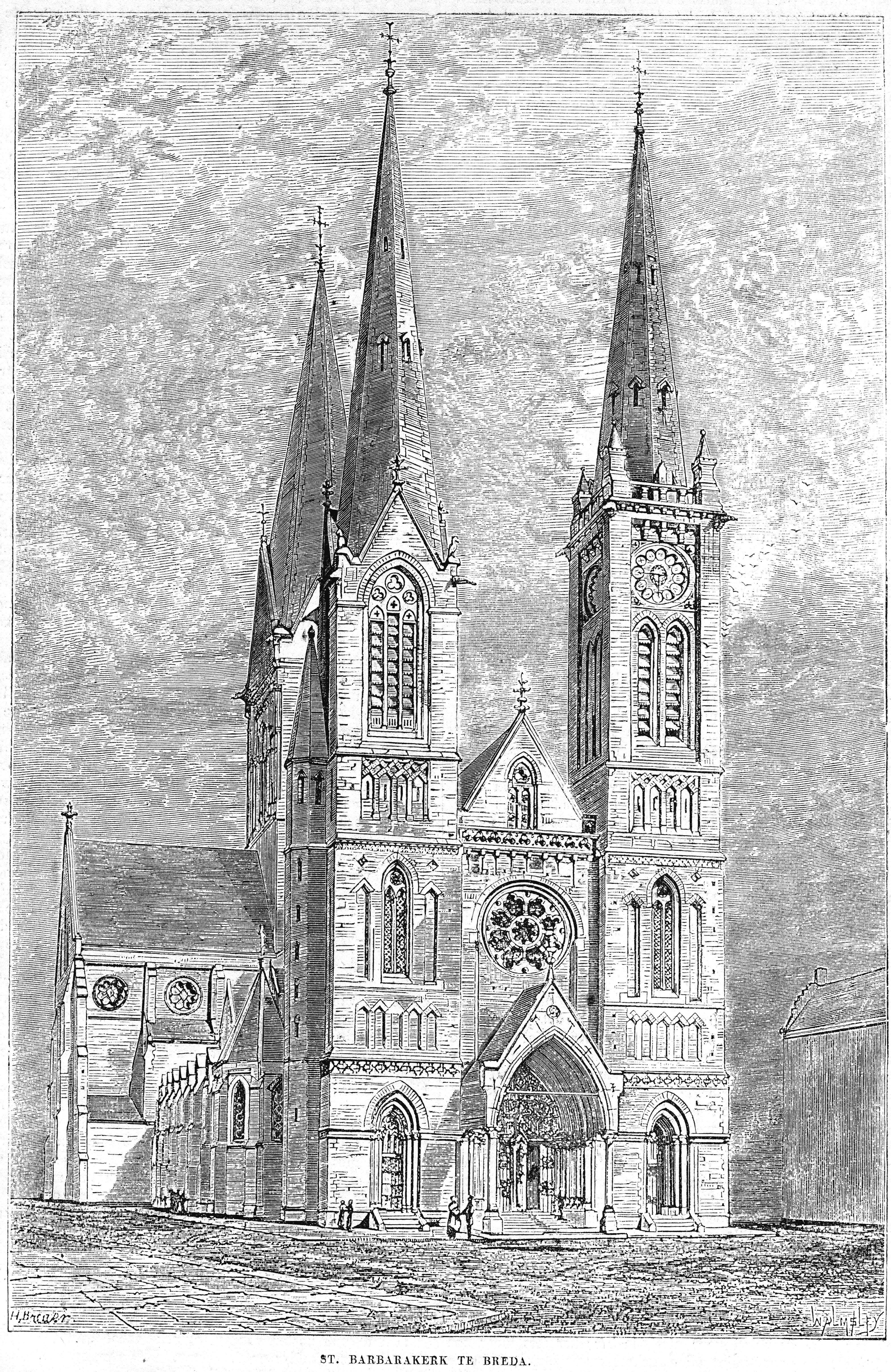 Kath.Illustratie 1869-1870 nr49 p.388 St.Barbarakerk te Breda